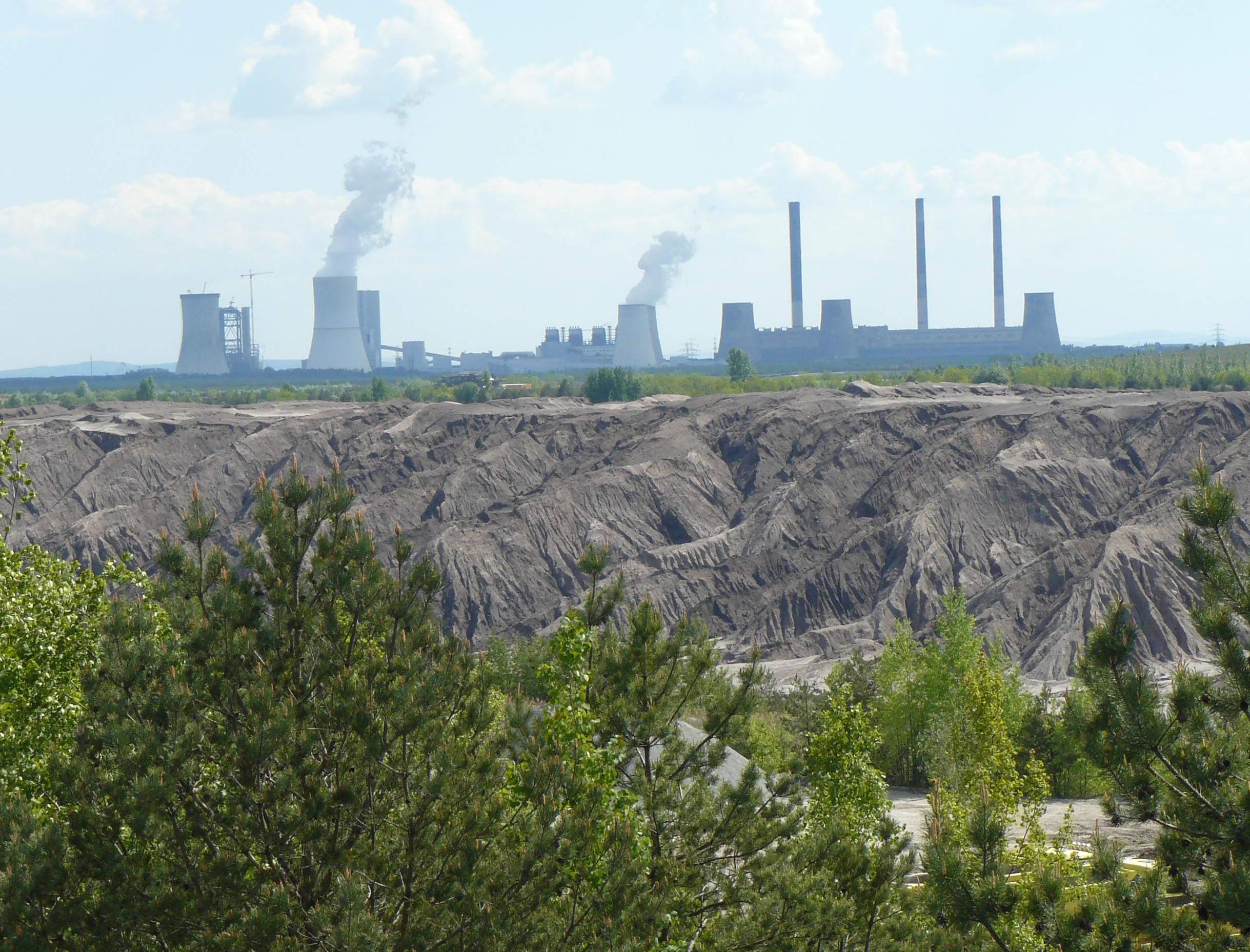 Mühlrose in Sachsen: Blick vom Schutzdamm über einen ausgekohlten Bereich des Tagebaus Nochten zum Kraftwerk Boxberg mit dem Neubaublock R (links), dem Werk 4 (900 MW), dem Werk 3 in der Mitte (2×500 MW) und dem still gelegten alten Kraftwerksteilen (rechts).